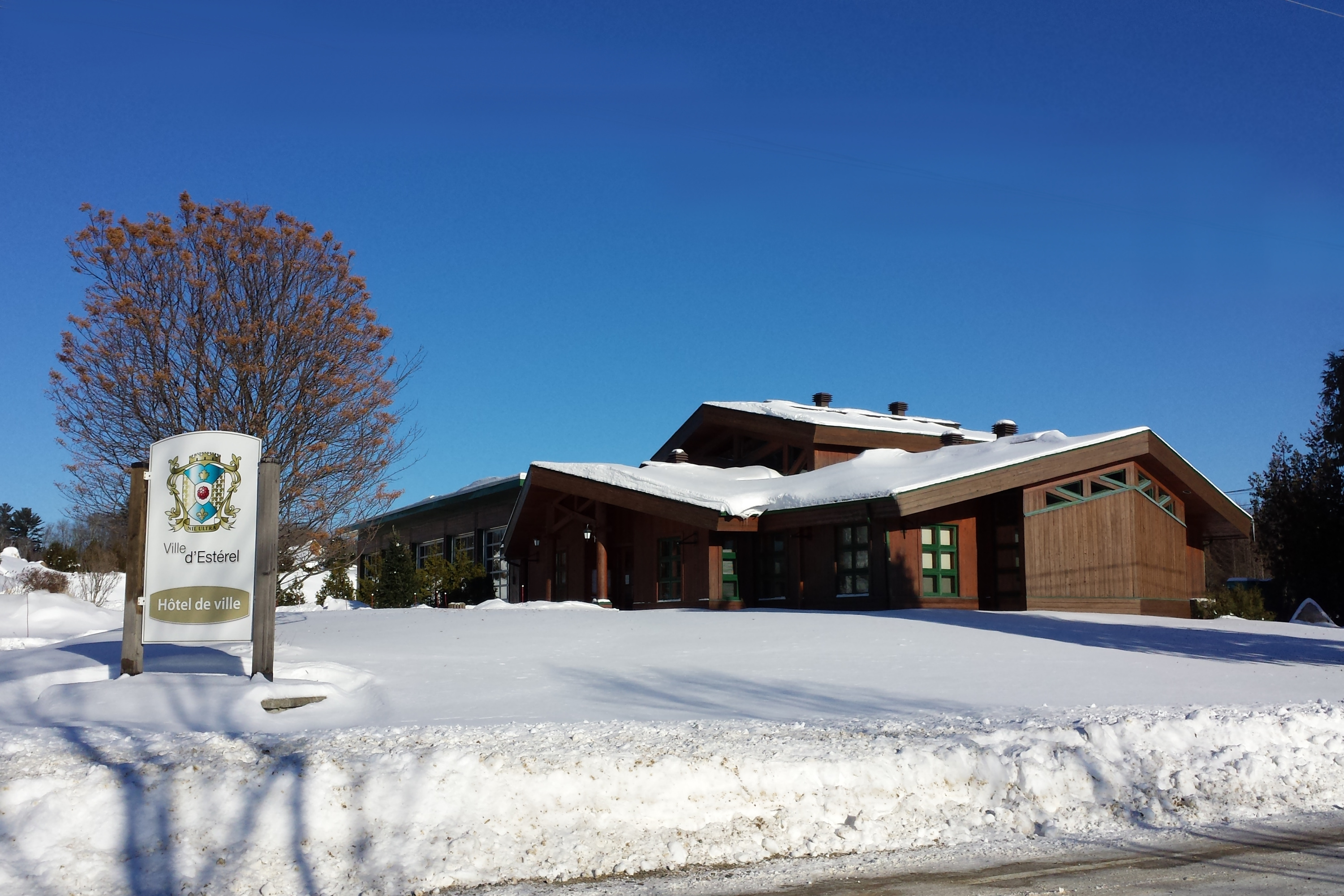 Estérel, Quebec, Canada